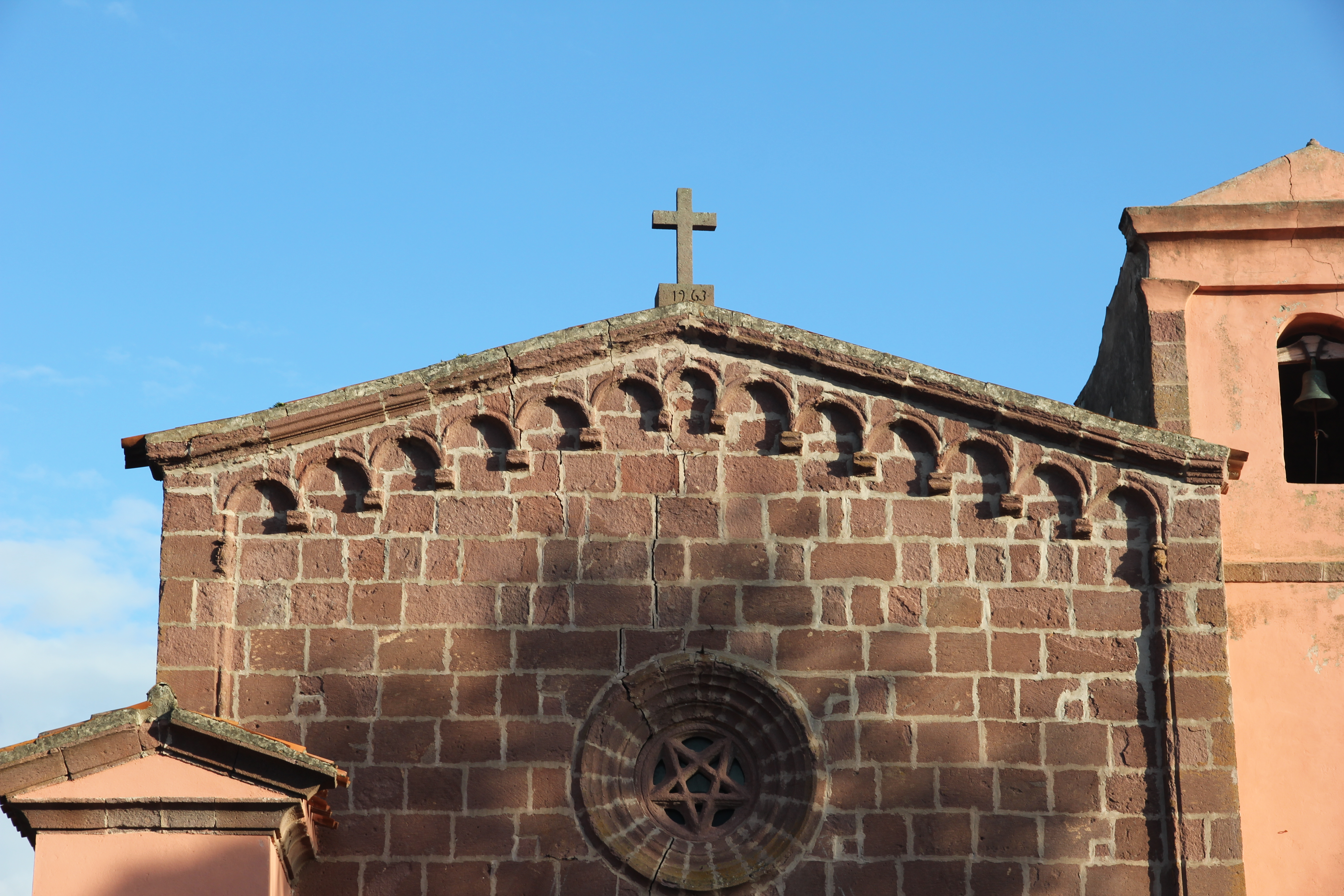 Bosa - Chiesa di Sant'Antonio Abate